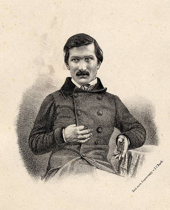 Portrait des Architekten Johann Georg Müller